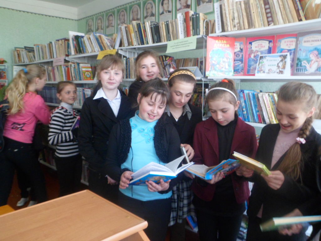 Читати-це модно